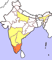 Kartan bygger på resultatet från valet till Lok Sabha april/maj 2004. Gult betyder att partiet lanserat en eller flera kandidater i delstaten, dock utan att vinna mandat. Orange betyder att partiet vunnit mandat från delstaten. Rött betyder att partiet vunnit minst 25% av mandaten från den delstaten och mörkrött 50% eller mer. Kartan tar inte hänsyn till avhopp, partifusioner och fyllnadsval under den ordinarie mandatperiodens gång. Gjord av Soman.